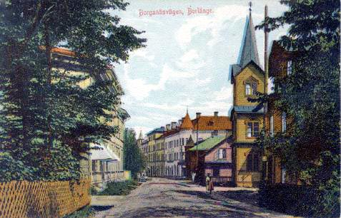 Borlänge. Collorerat vykort från omkr. år 1900.